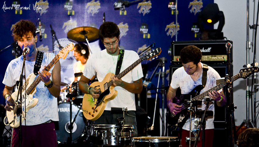 La Vida Bohème en el evento "No te perdiste de nada" hecho en Caracas, Venezuela en Julio de 2009. Cortesía de Álvaro Coronel.